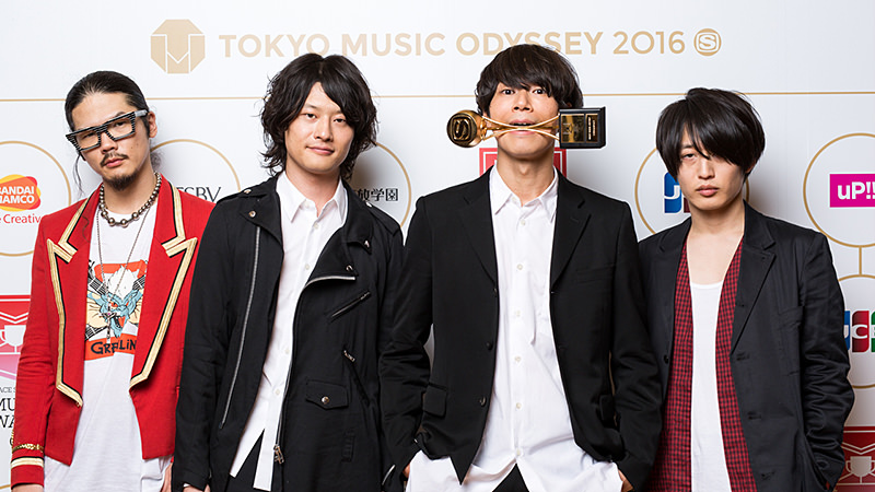 [Alexandros]のアーティストイメージ